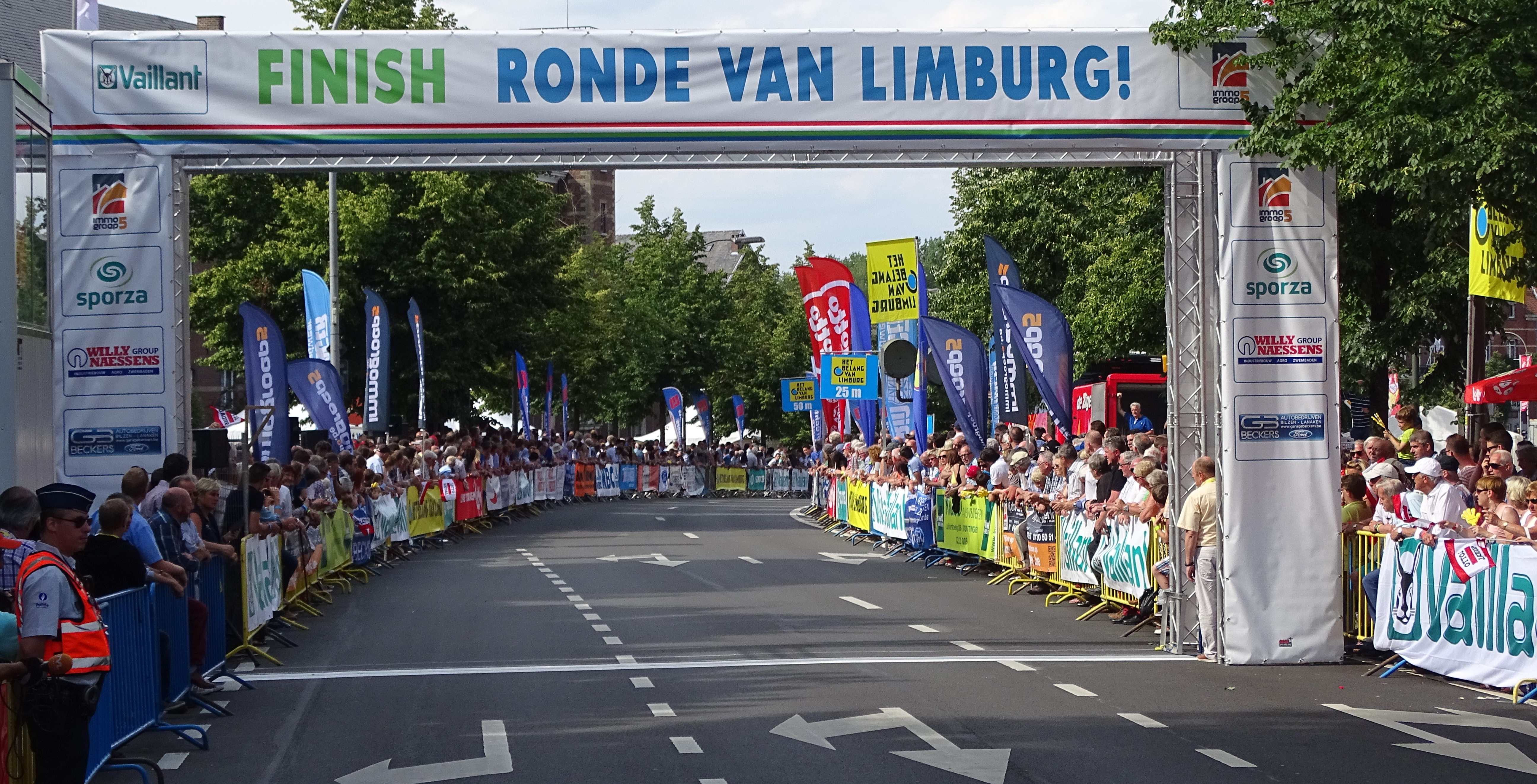 Reportage réalisé le dimanche 14 juin à l'occasion du départ et de l'arrivée du Tour du Limbourg 2015 à Tongres, Belgique.